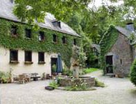 Kolliger Muehle, Wohnhaus